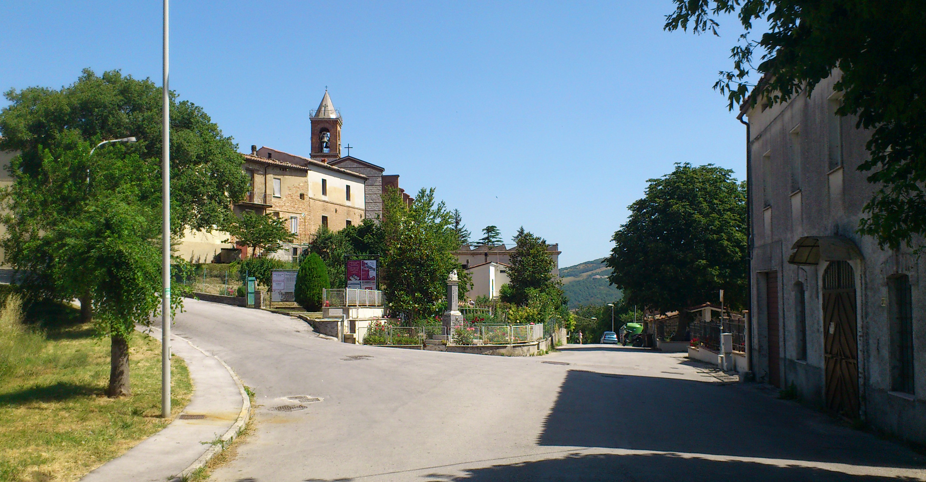 Arrivée par Fabriano, à droite, il Mulino, à gauche la montée su'la piazza